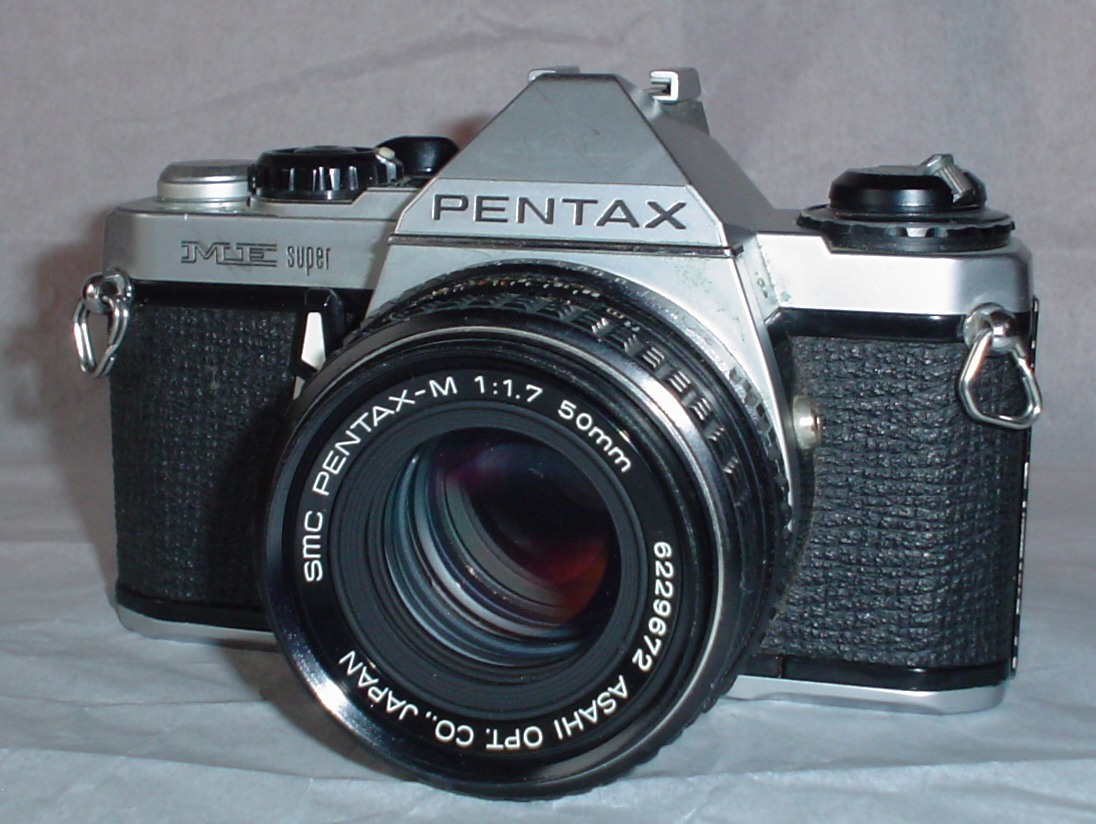 Pentax ME Super with Takumar 50/1.7